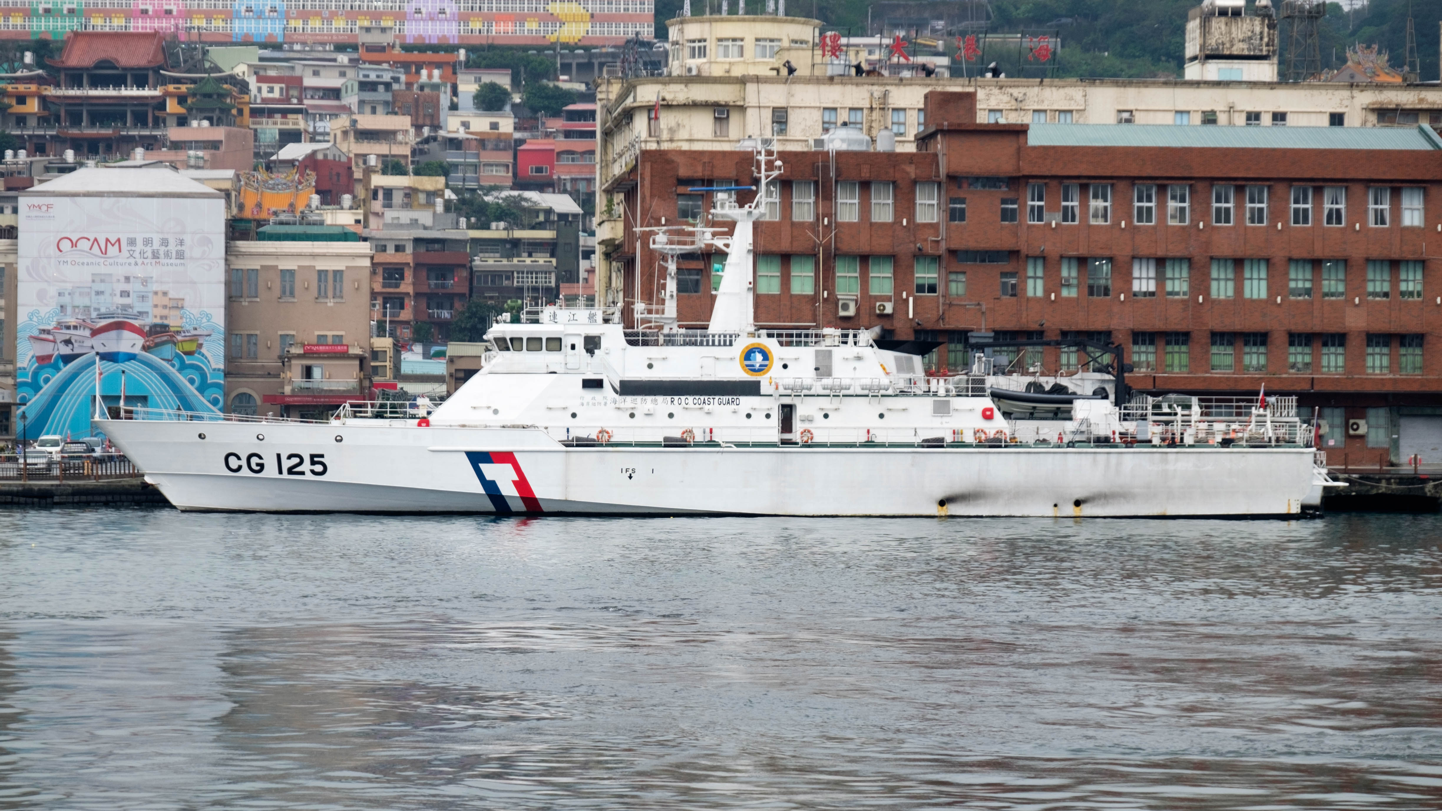 中文（台灣）: 停泊基隆港西岸海關大樓前的海巡署巡防救難艦連江（CG 125）。